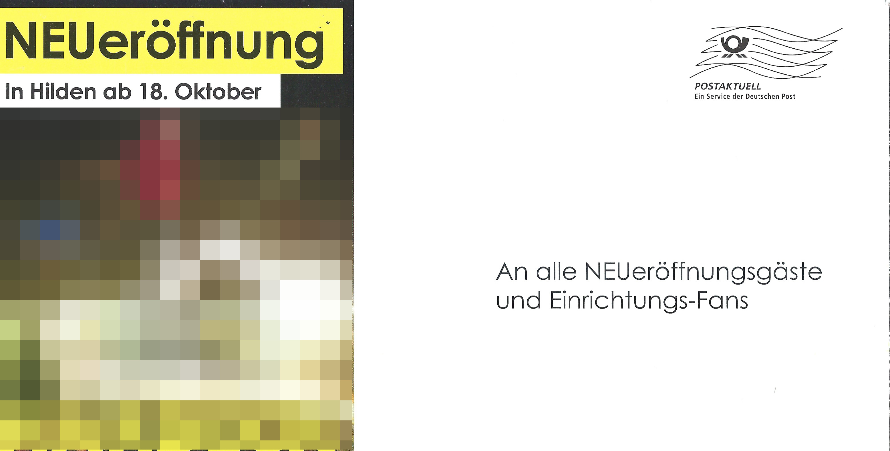 Briefumschlag einer Werbesendung, Versandart „Postaktuell“, durch die Deutsche Post, zur Neueröffnung eines Einrichtungshauses. Das Bild links wurde aus urheberrechtlichen Gründen verpixelt